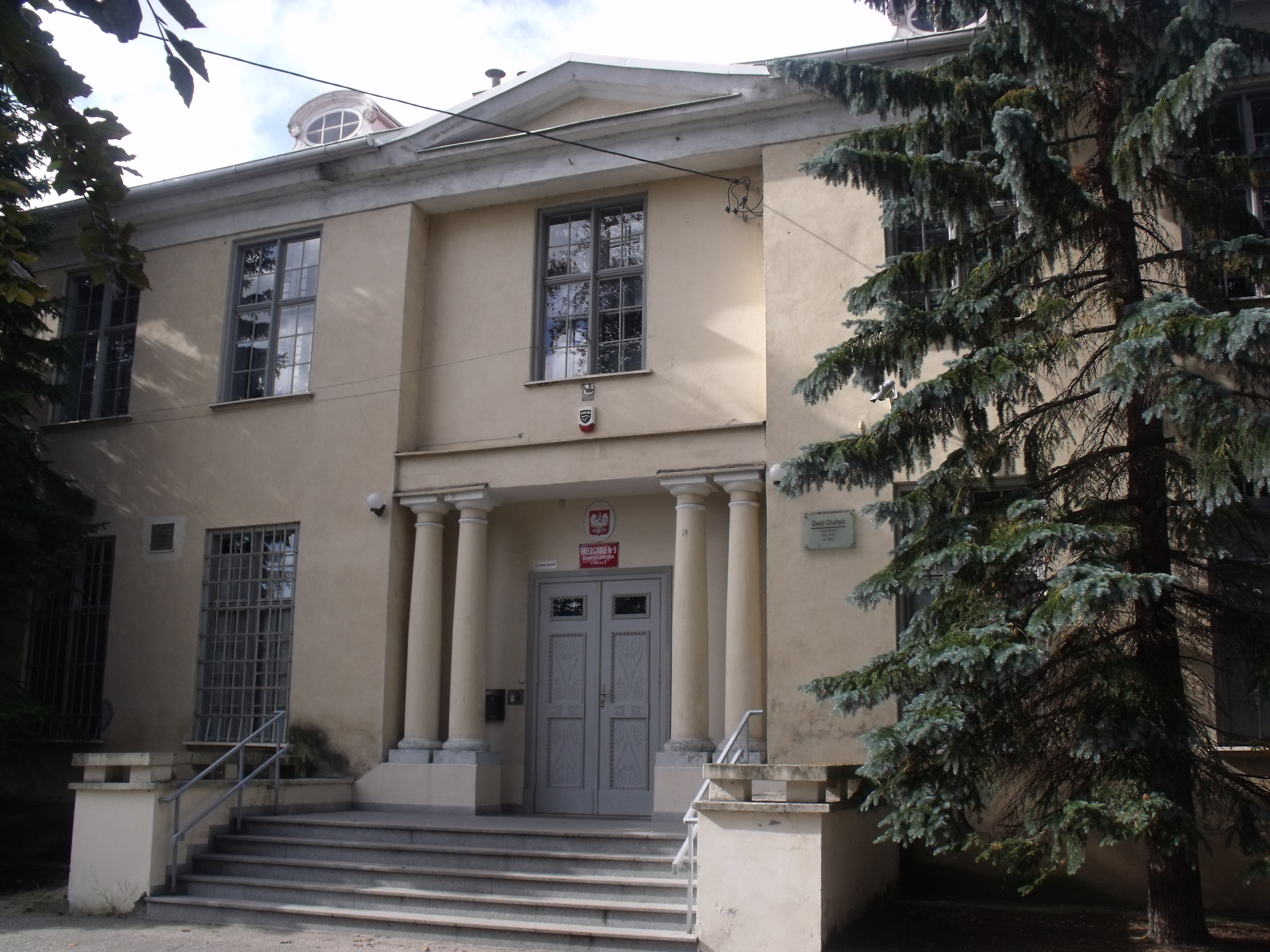 Gdańsk Orunia, ul. Nowiny 2 - zespół dworsko-parkowy (dwór, park lodownia, dwa budynki gospodarcze) w granicach określonych na załączniku graficznym nr 1 i nr 2 do decyzji